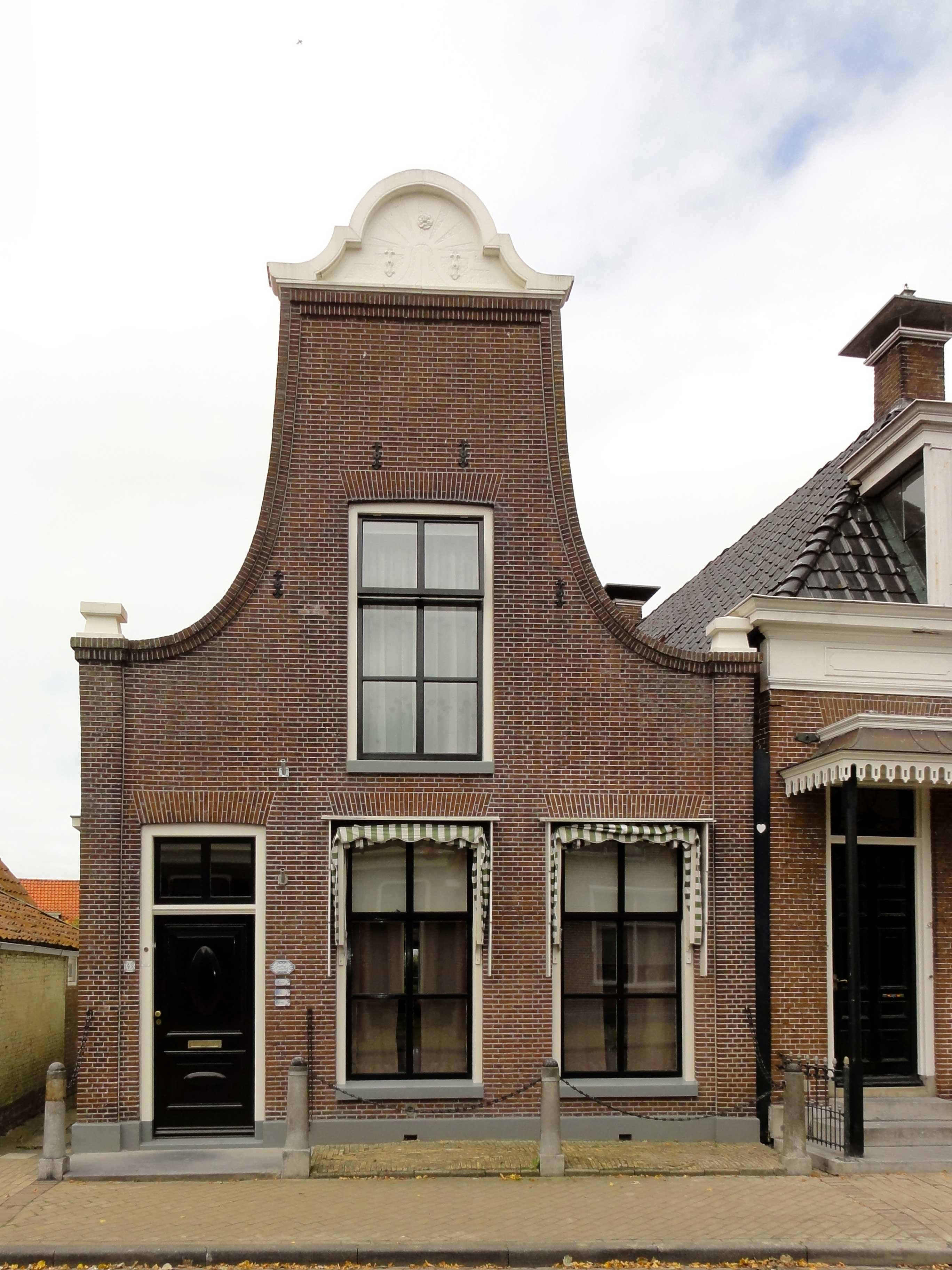 Kerkstraat 43 te Makkum